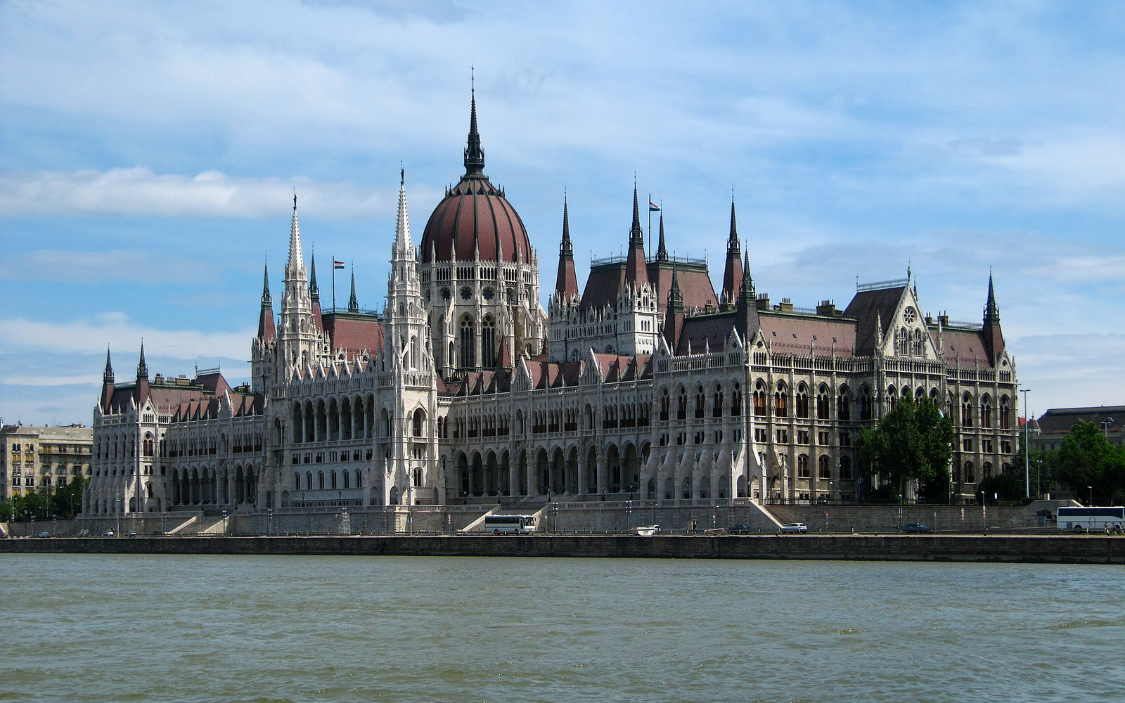 Országház (Budapest 5, Kossuth Lajos tér 1-3., Széchenyi István rakpart 11.) This is a photo of a monument in Hungary, Identifier: 509